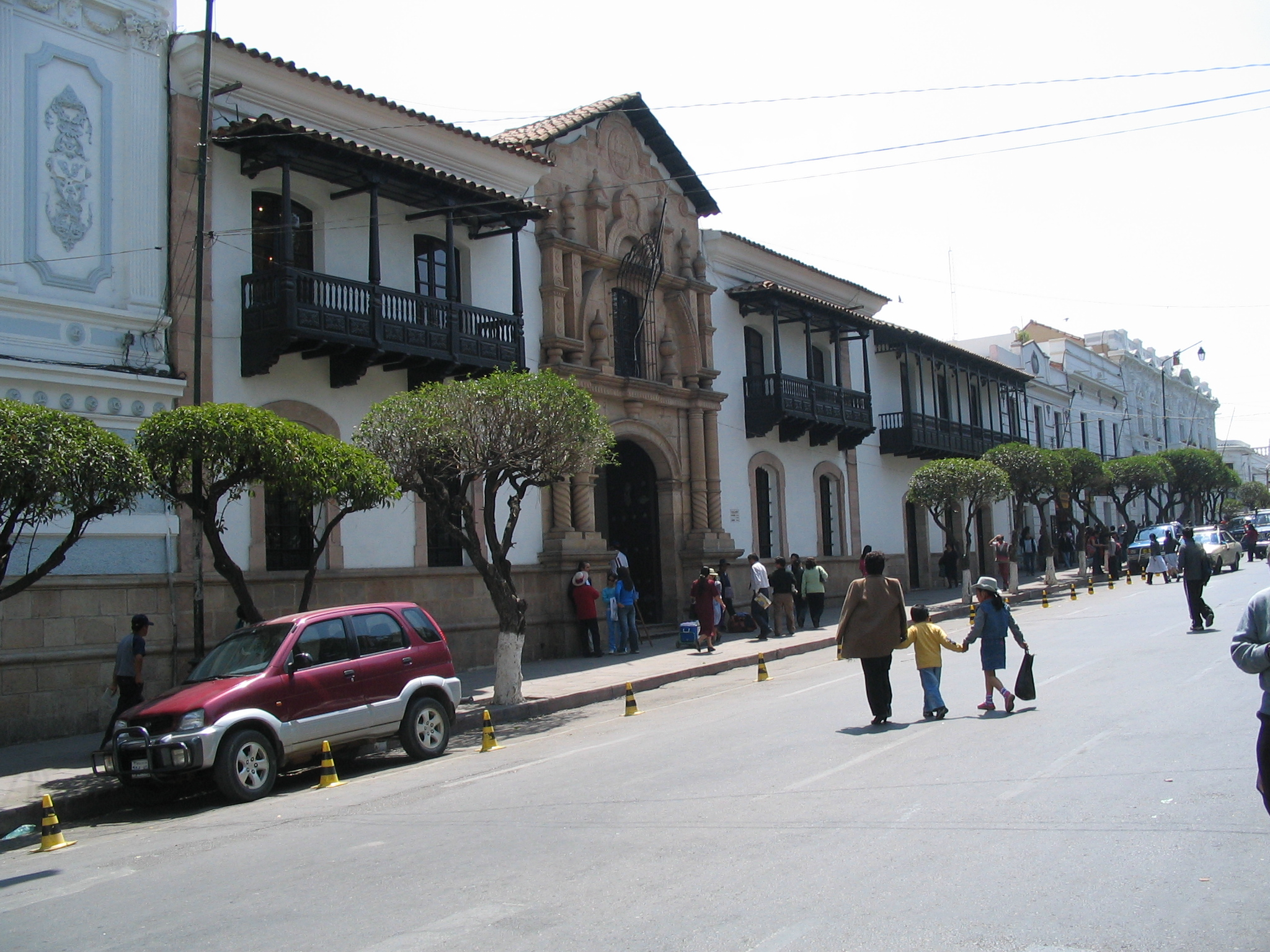 Casa de la libertad (Maison de la liberté) dans la capitale de la Bolivie : Sucre. C'est ici que fut signé le traité d'indépendance de la Bolivie. Traité qui fut écrit par Simón Bolívar.